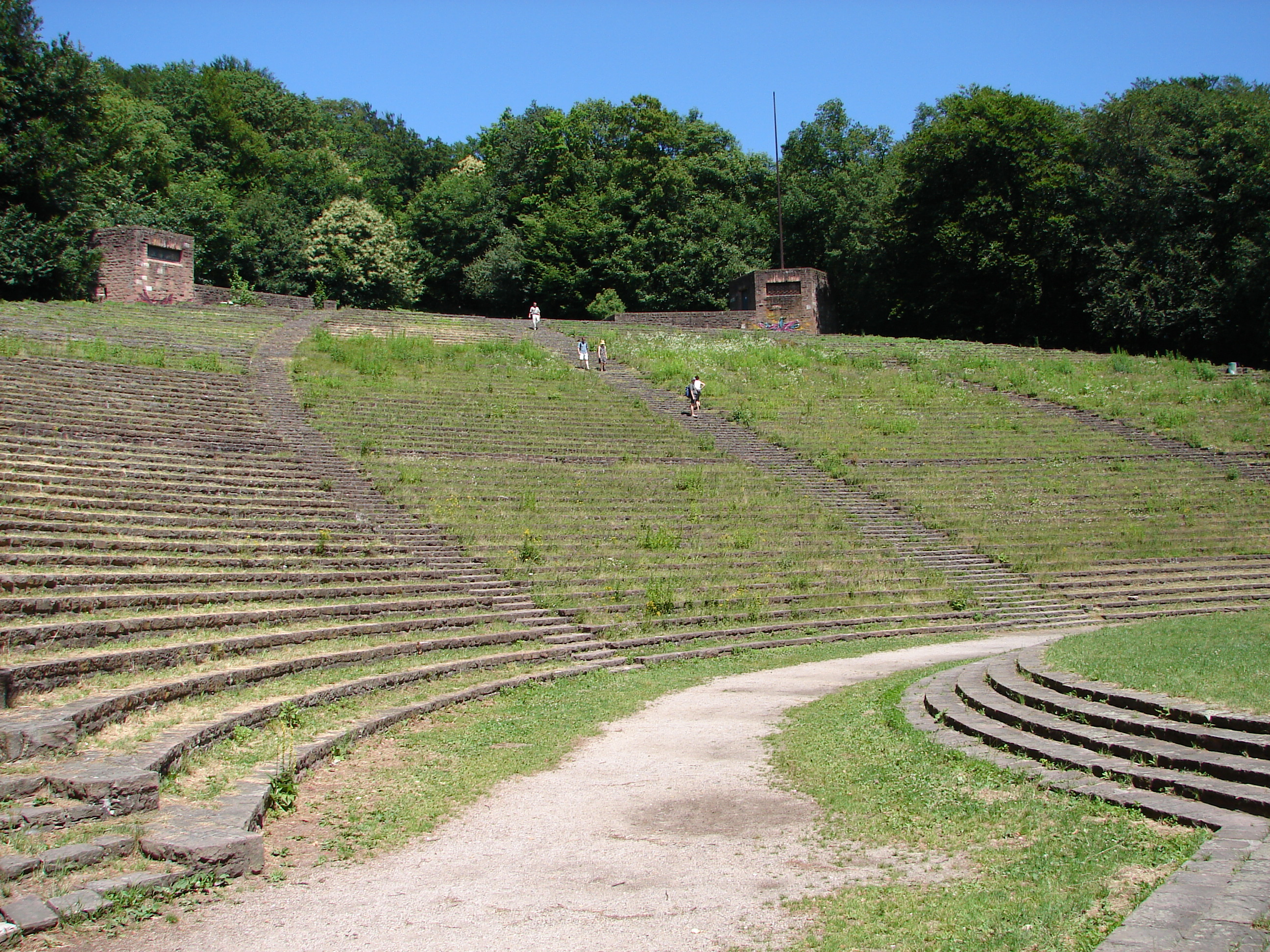 Thingstätte Heidelberg. Blick auf die Tribüne